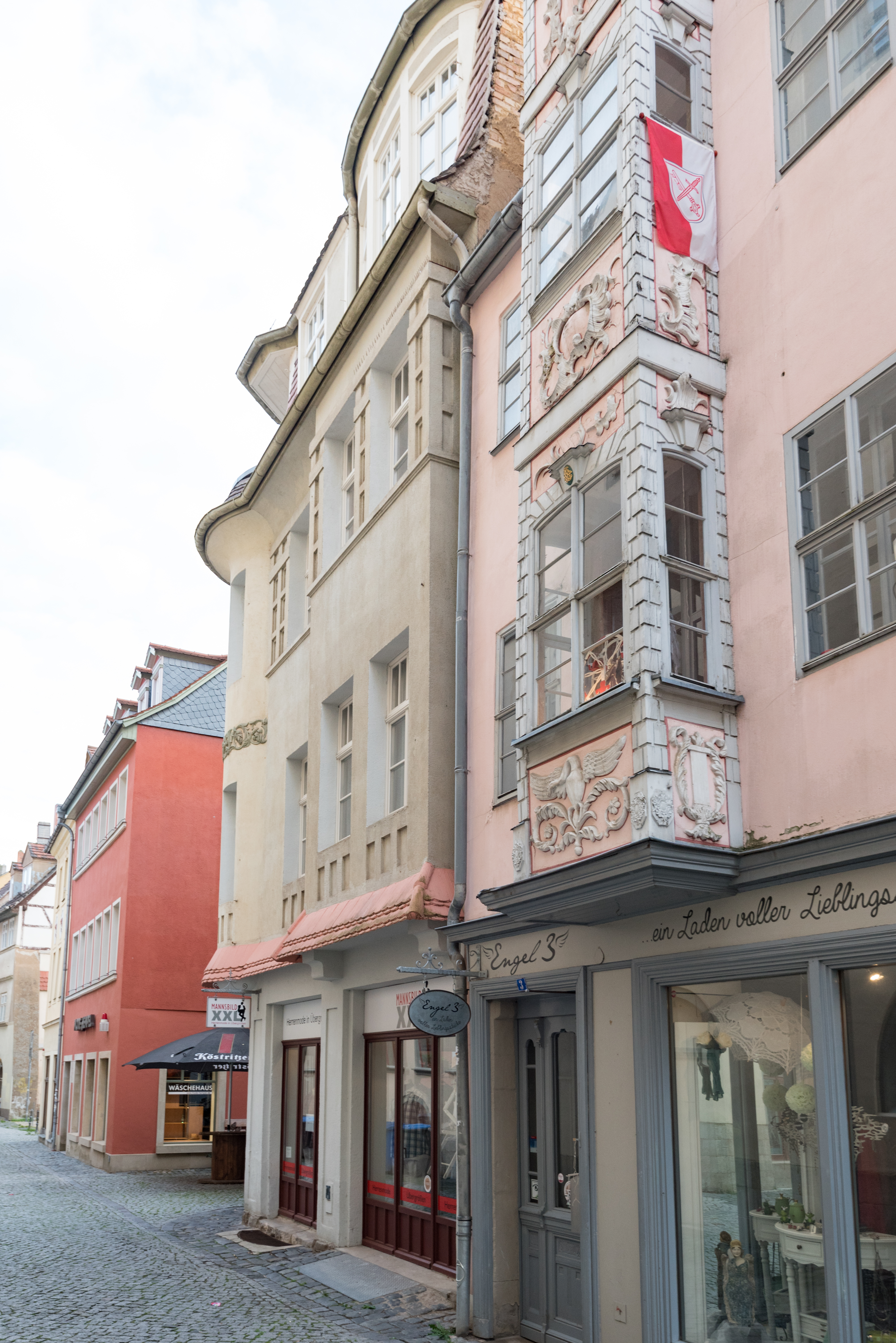 Naumburg (Saale), Engelgasse 4